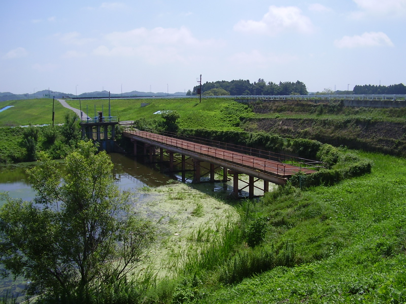 宮城県宮城郡松島町幡谷にある吉田川サイフォンの入口の写真。撮影日 2011-08-09